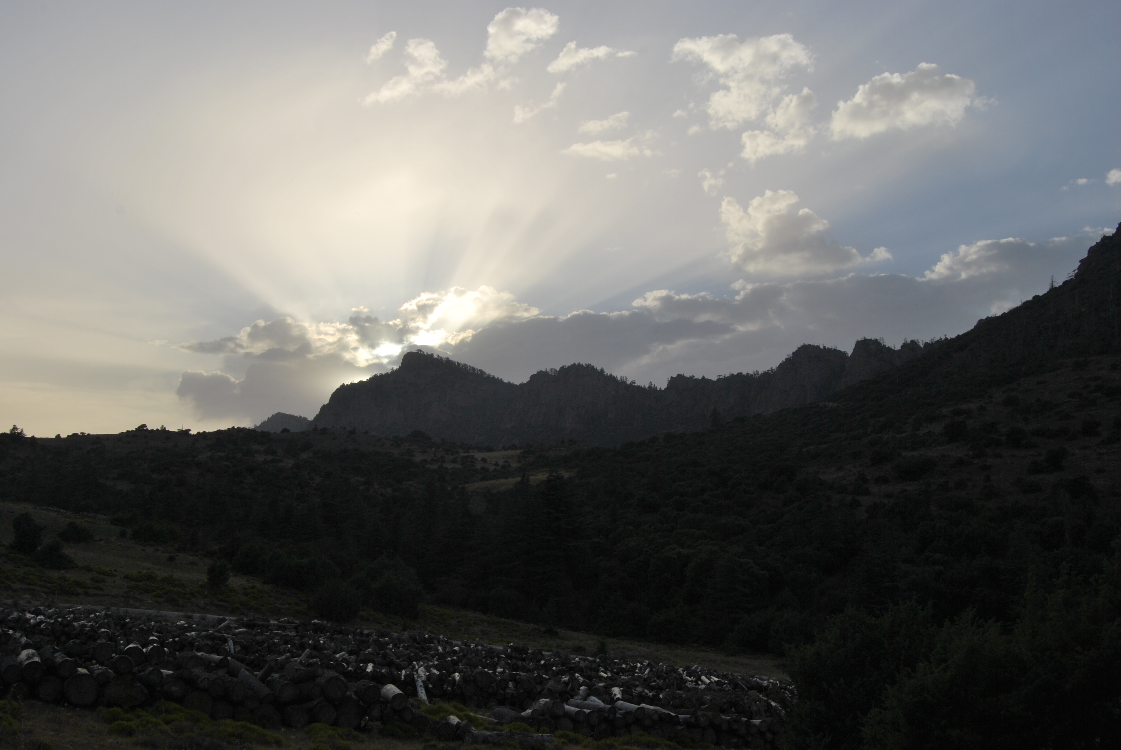 Foret près de Oued Chaaba